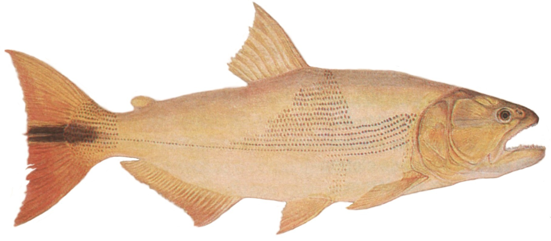 Desenho de um dourado (Salminus brasiliensis), por Johann Natterer, parte da missão ao Brasil de naturalistas do imperador austríaco Francisco I, de 1817 a 1835